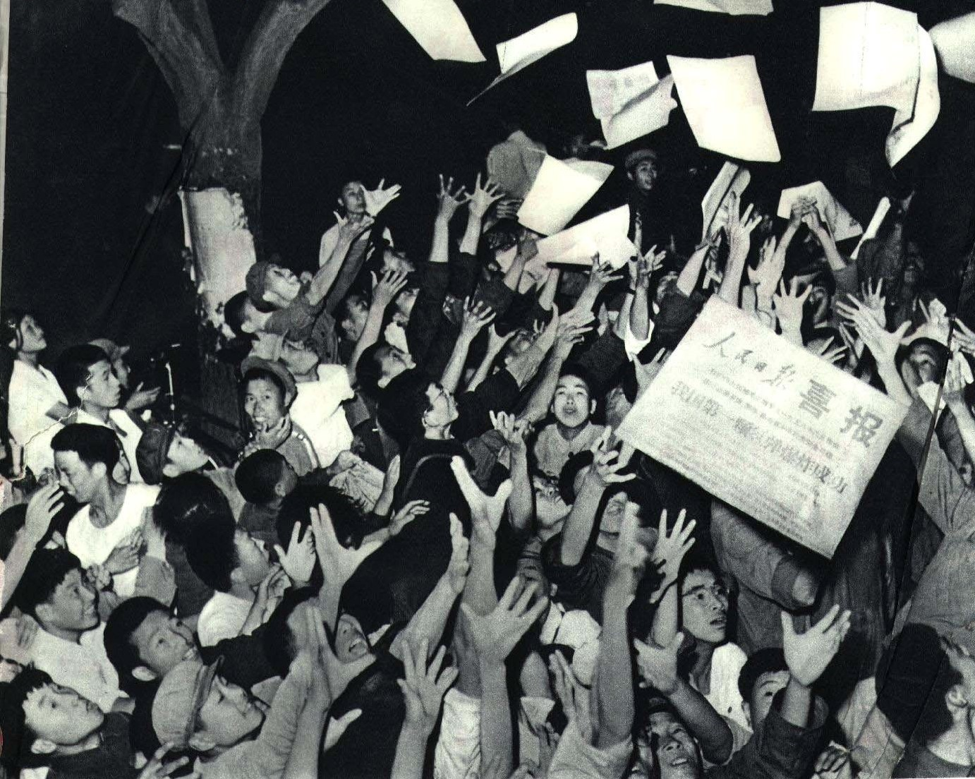 1967-08 1967年 民众庆祝中国氢弹试验成功